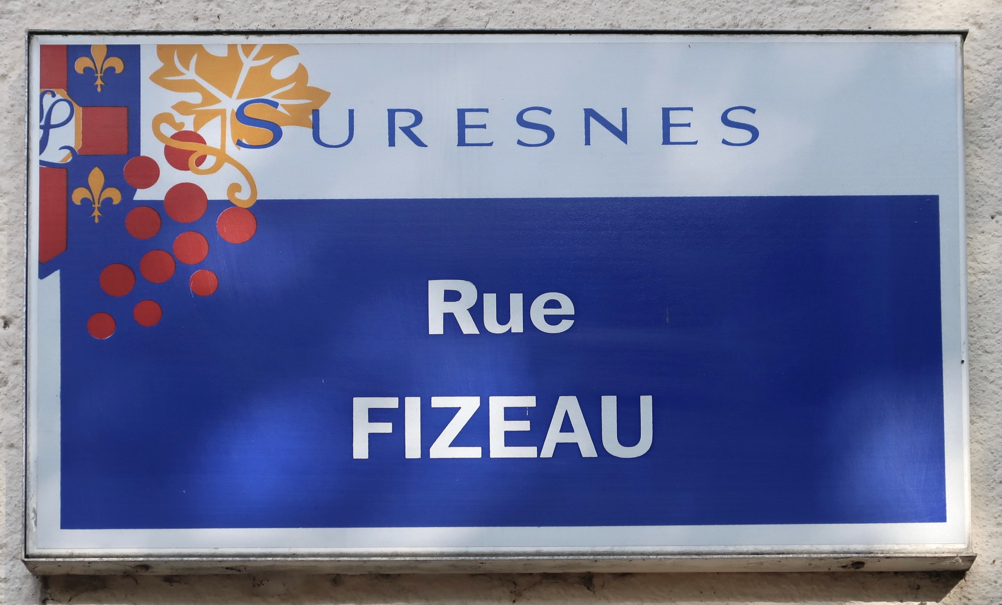 Plaque de la rue Fizeau à Suresnes (Hauts-de-Seine).